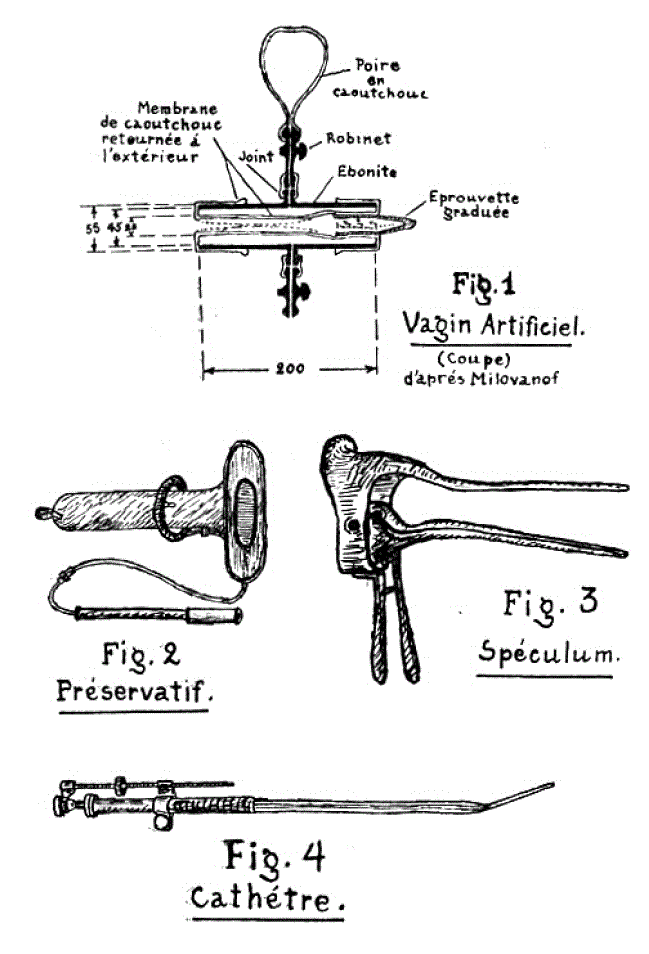 Instrumentos empleados en la Técnica de Inseminación Artificial